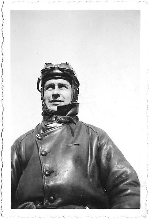 Charles Chesnais aviateur en 1940